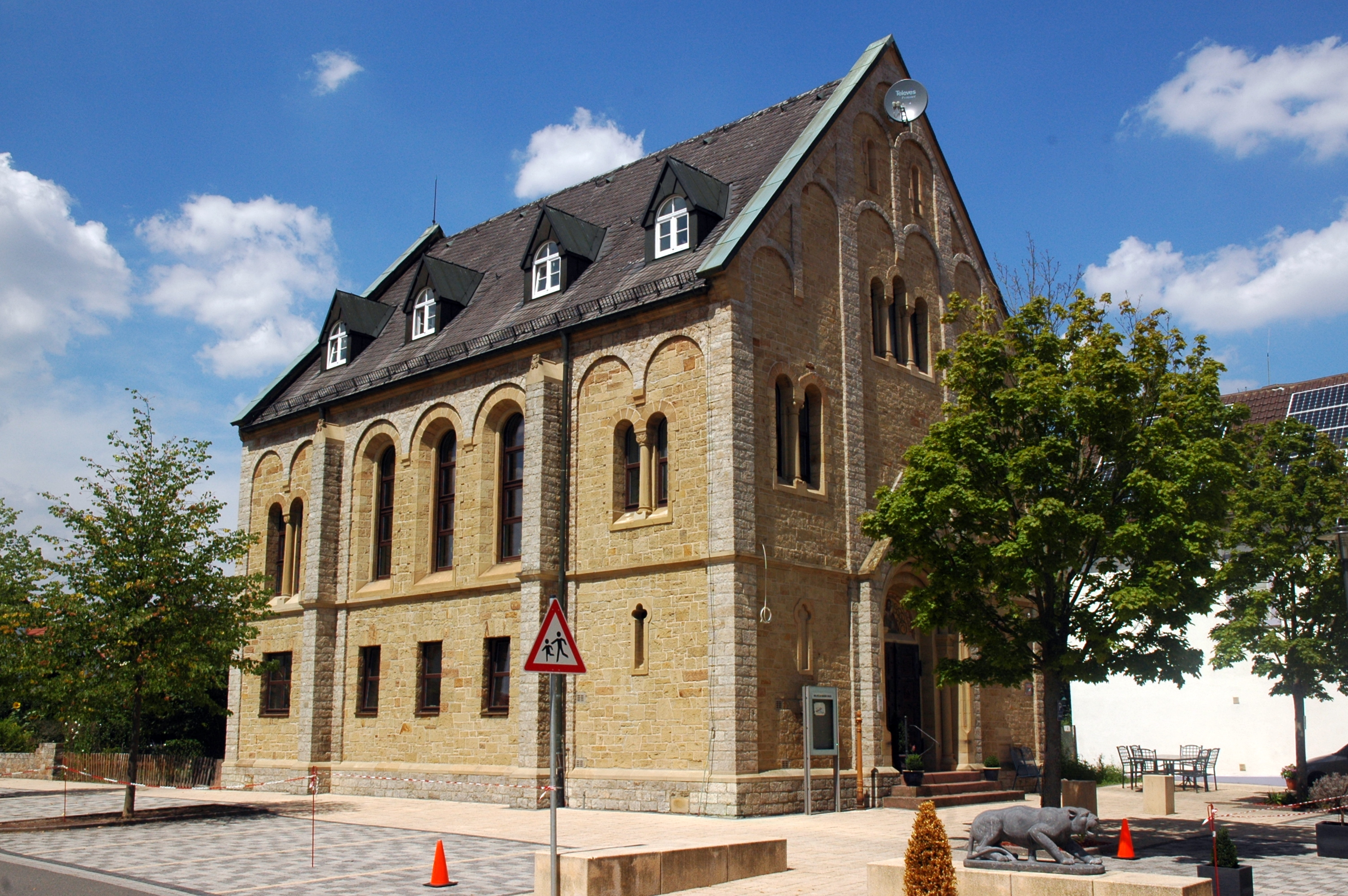 Wilhelm-Baden-Haus in Meckesheim.